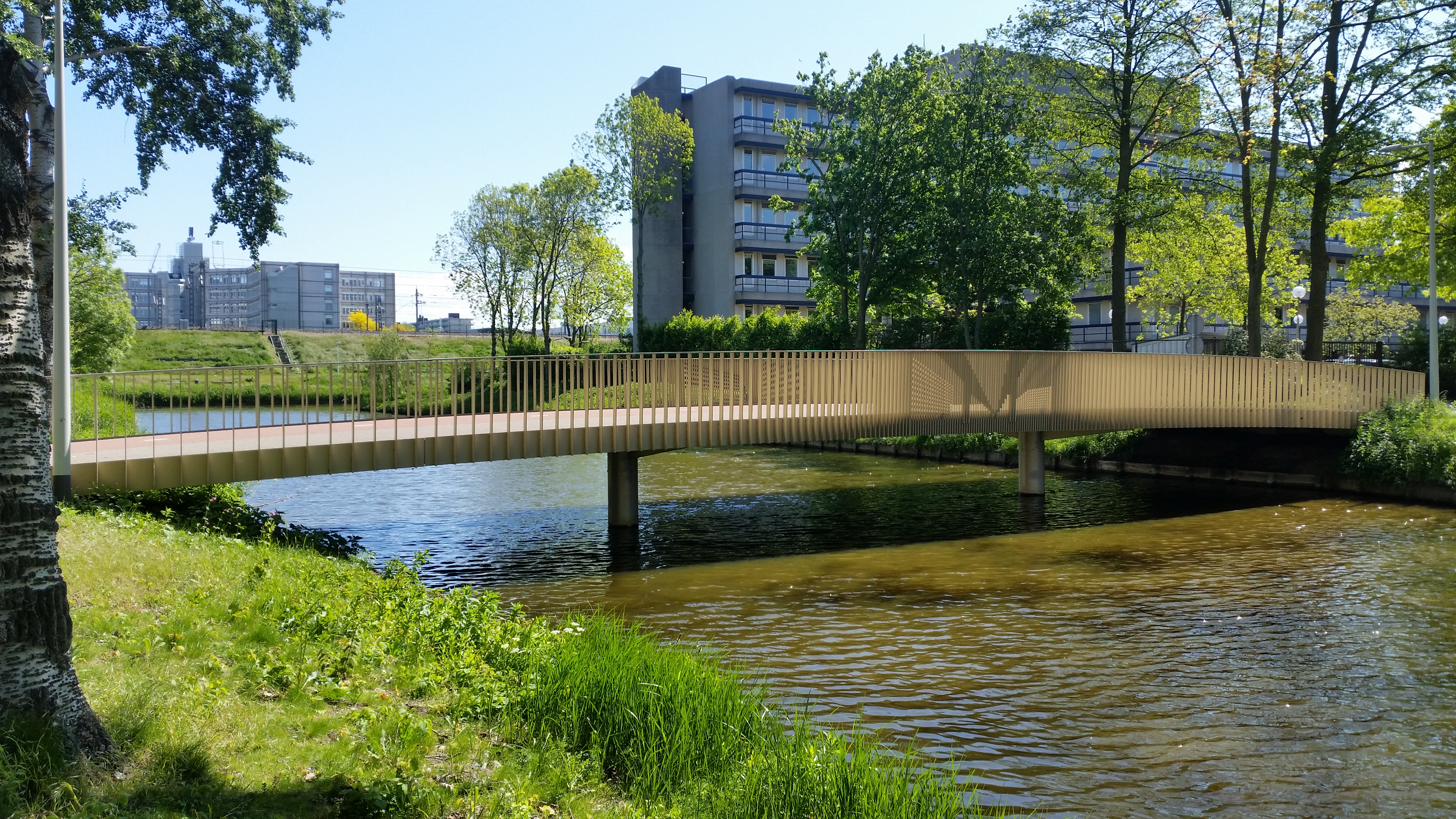 Zijaanzicht van Brug 1459 (in Amsterdam)